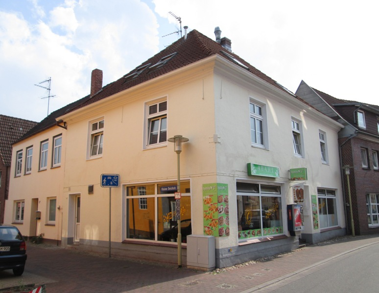 Kirche und Schule der niederländischen Gemeinden in Glückstadt (Reformierte, Remonstranten und Mennoniten)